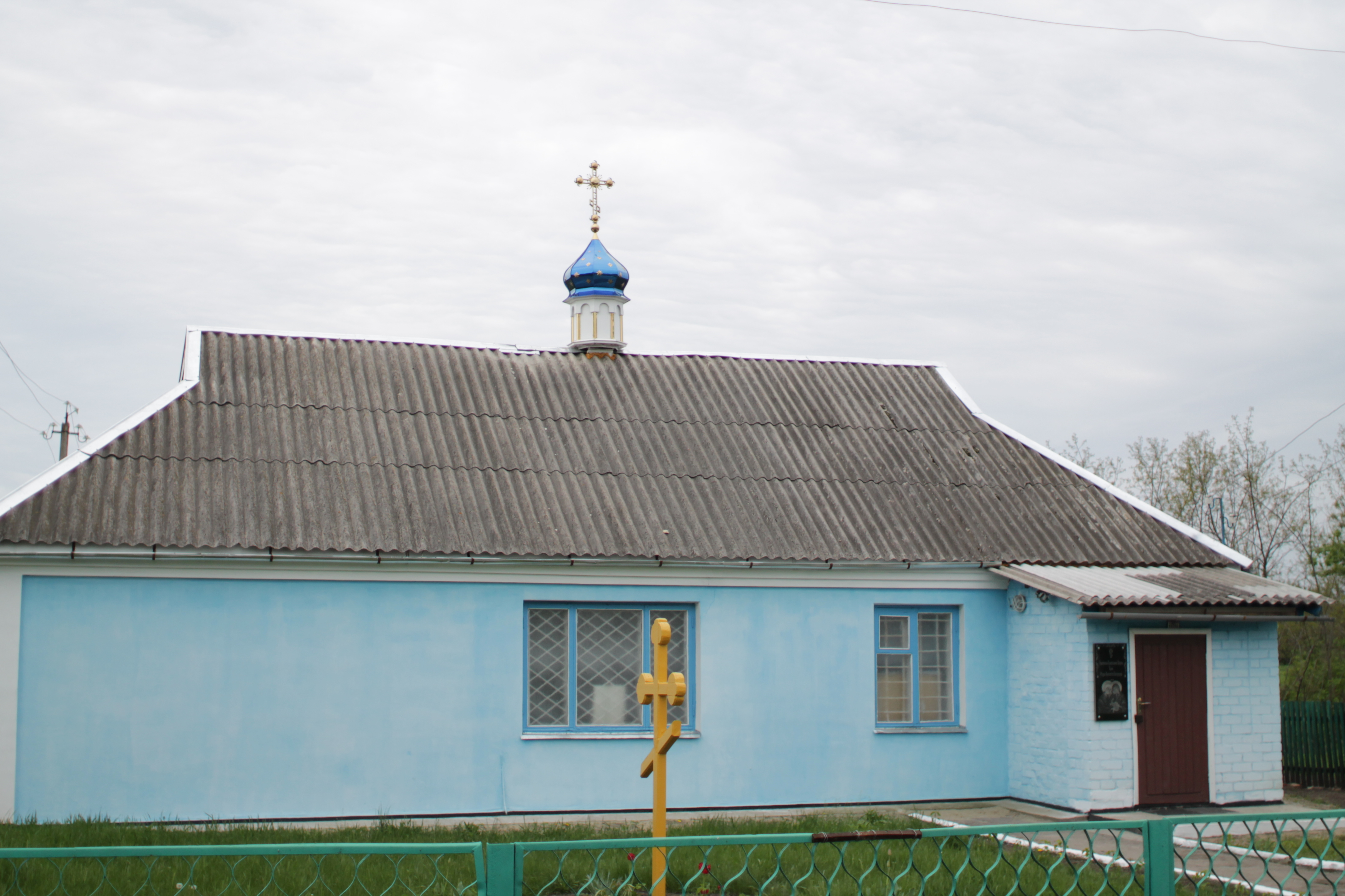 Зубані, Українська Православна Церква,1